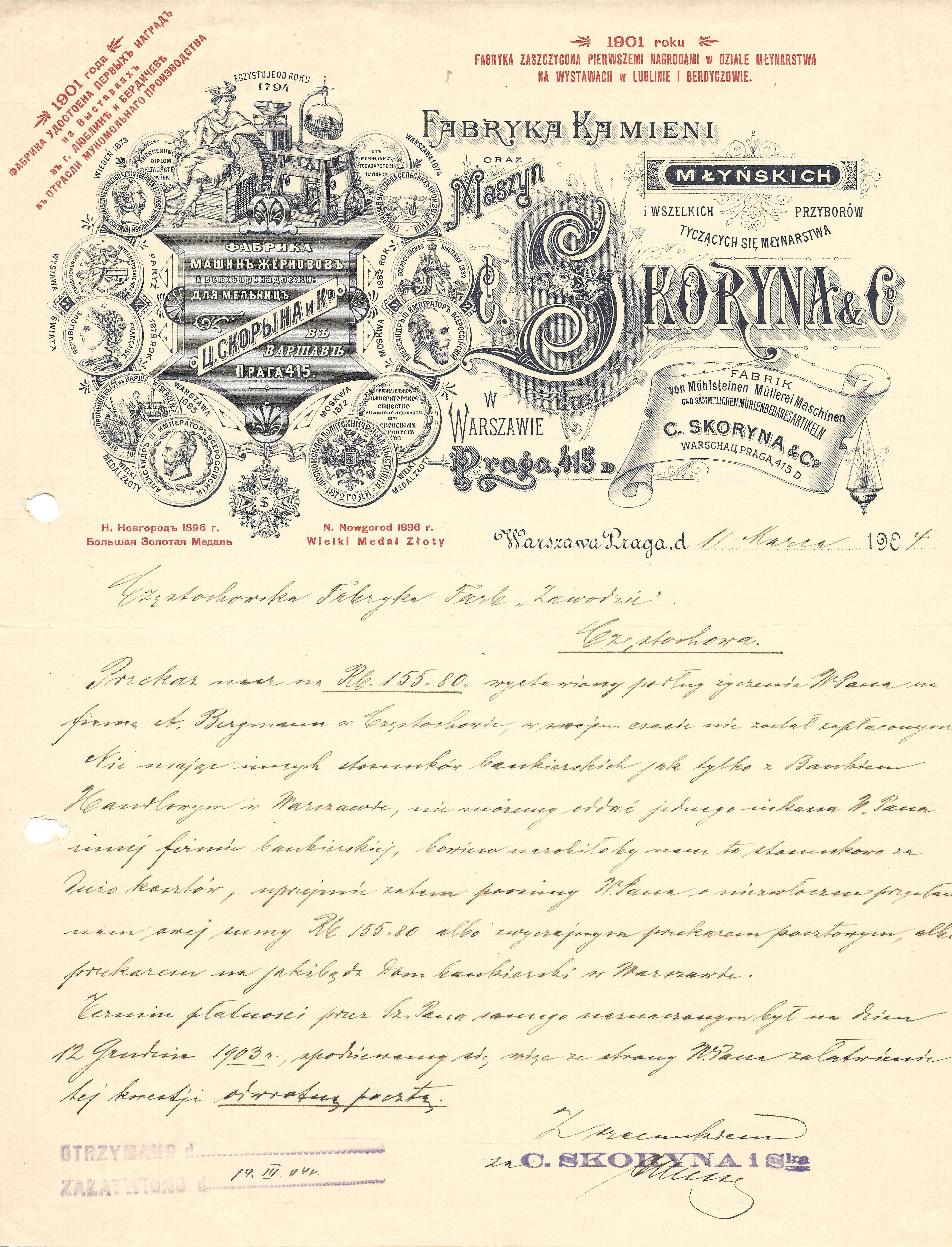 Dokument spółki C. Skoryna i S-ka